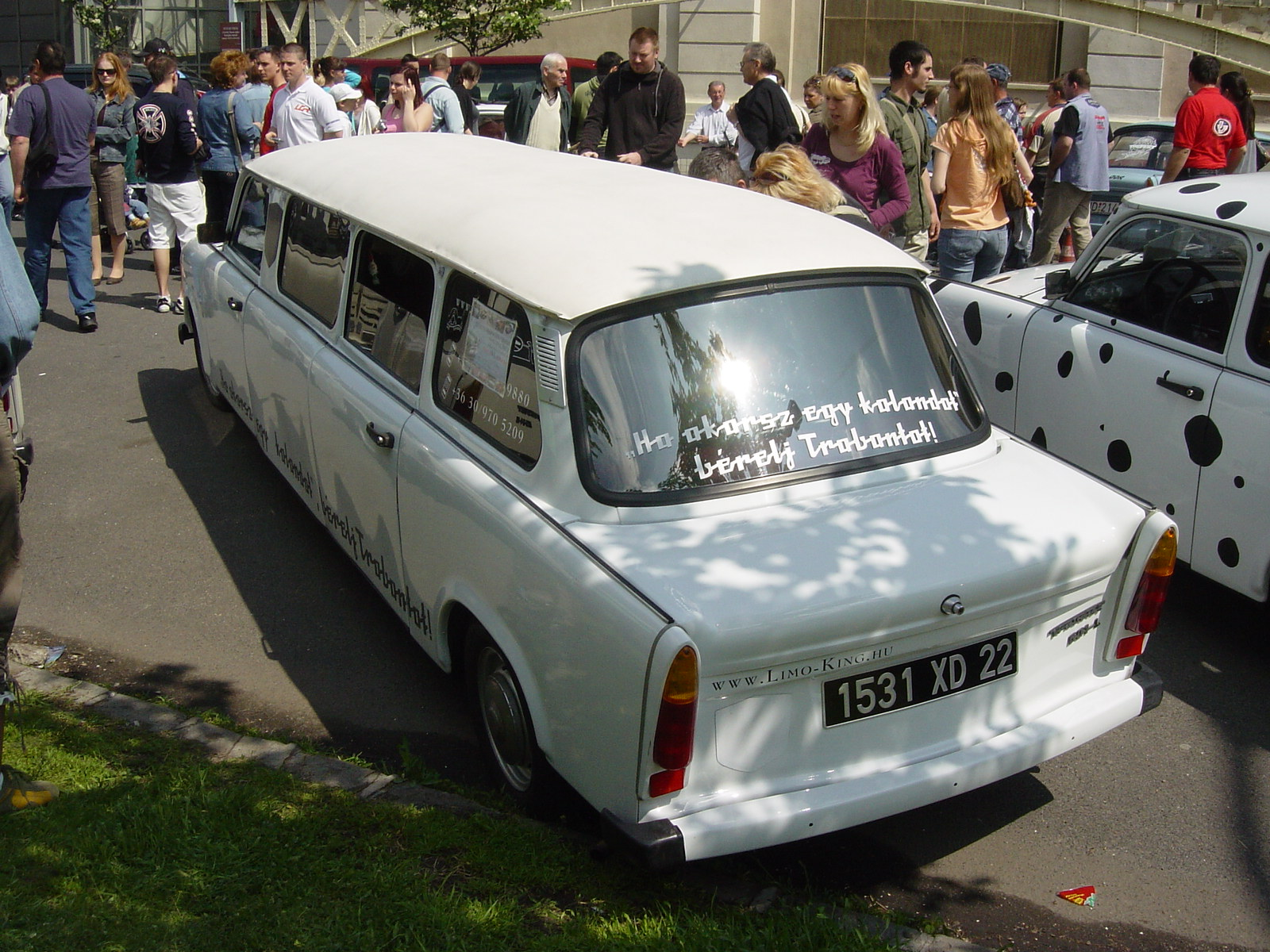 Trabant 601 L at the Szocialista Jáműipar Gyöngyszemei 2008.